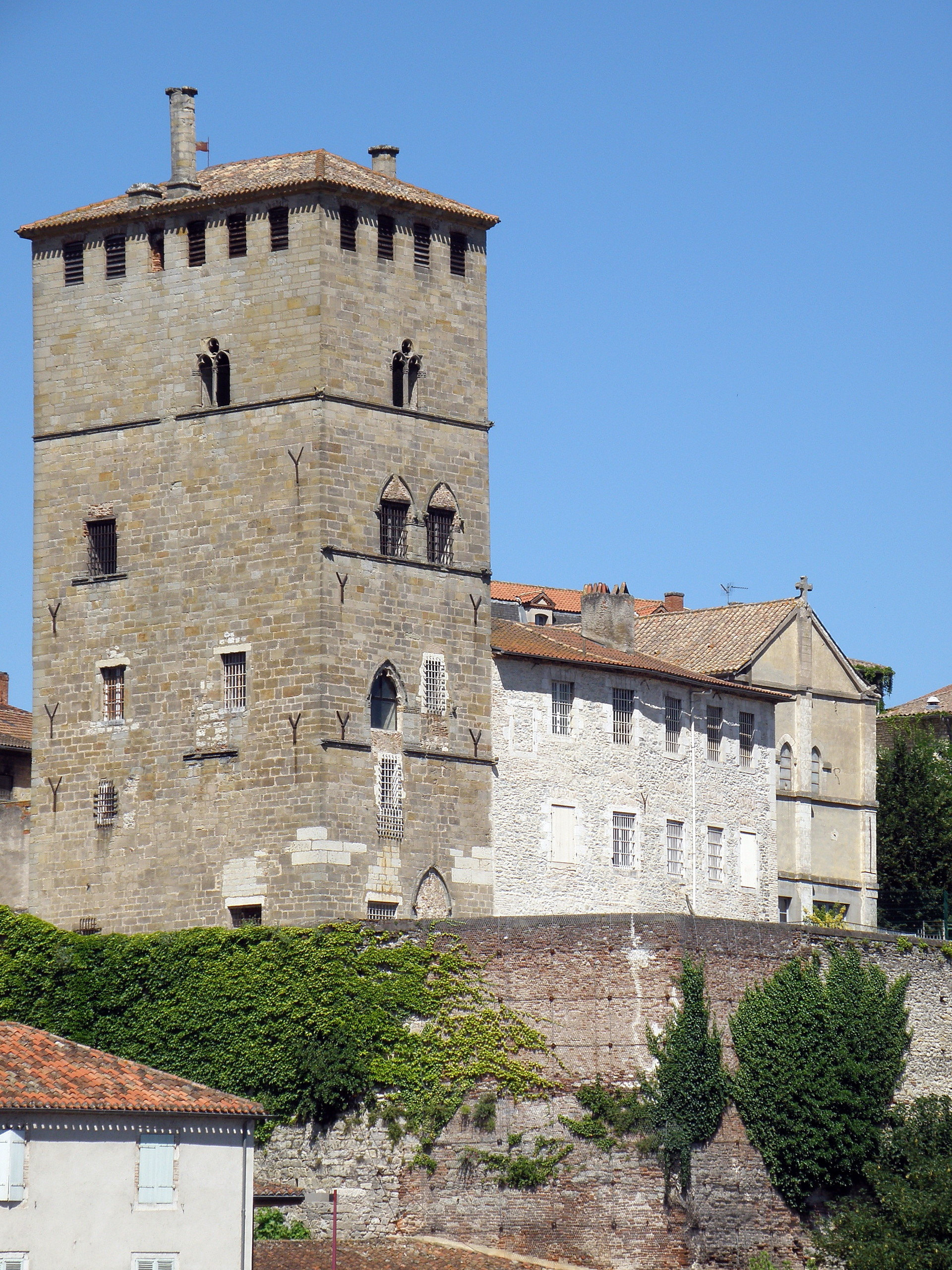 Cahors (Lot, France). Palais de Via, dit aussi Château-du-Roi, rue du Château du Roi, dans la vieille ville, vu depuis le pont de Cabessut.